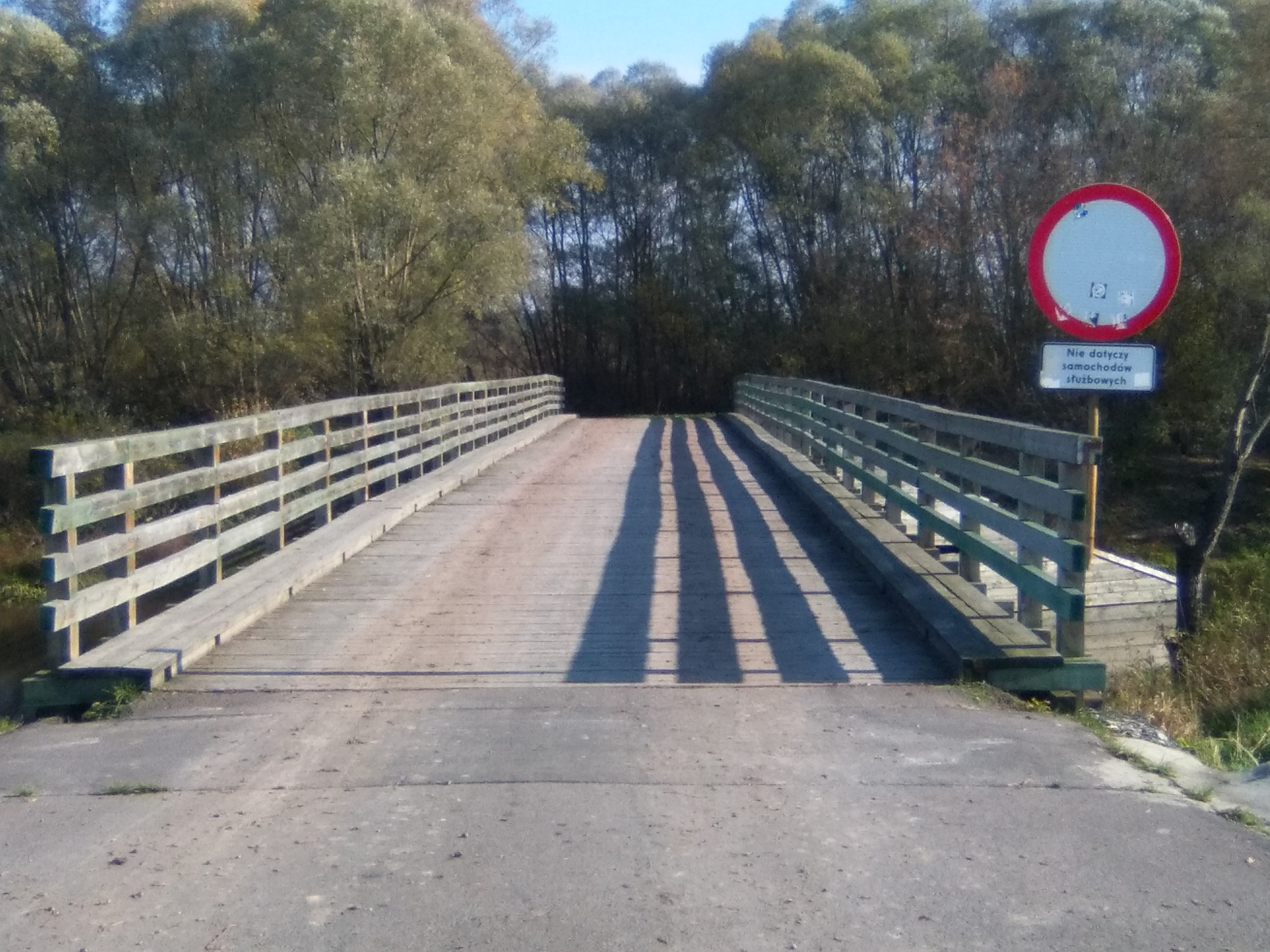 Most na Bużku w Kryłowie